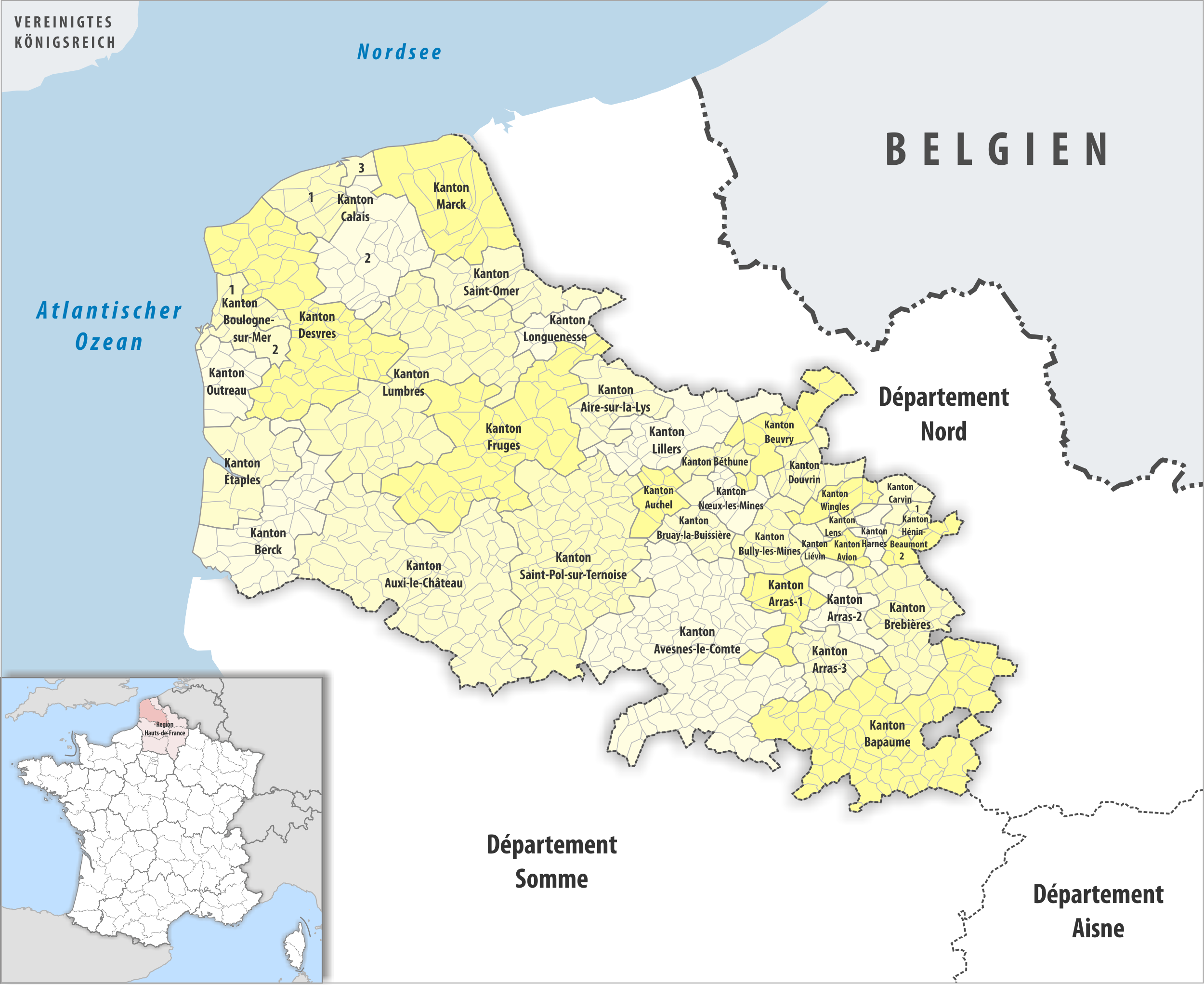 Gemeinden und Kantone im Departement Pas-de-Calais